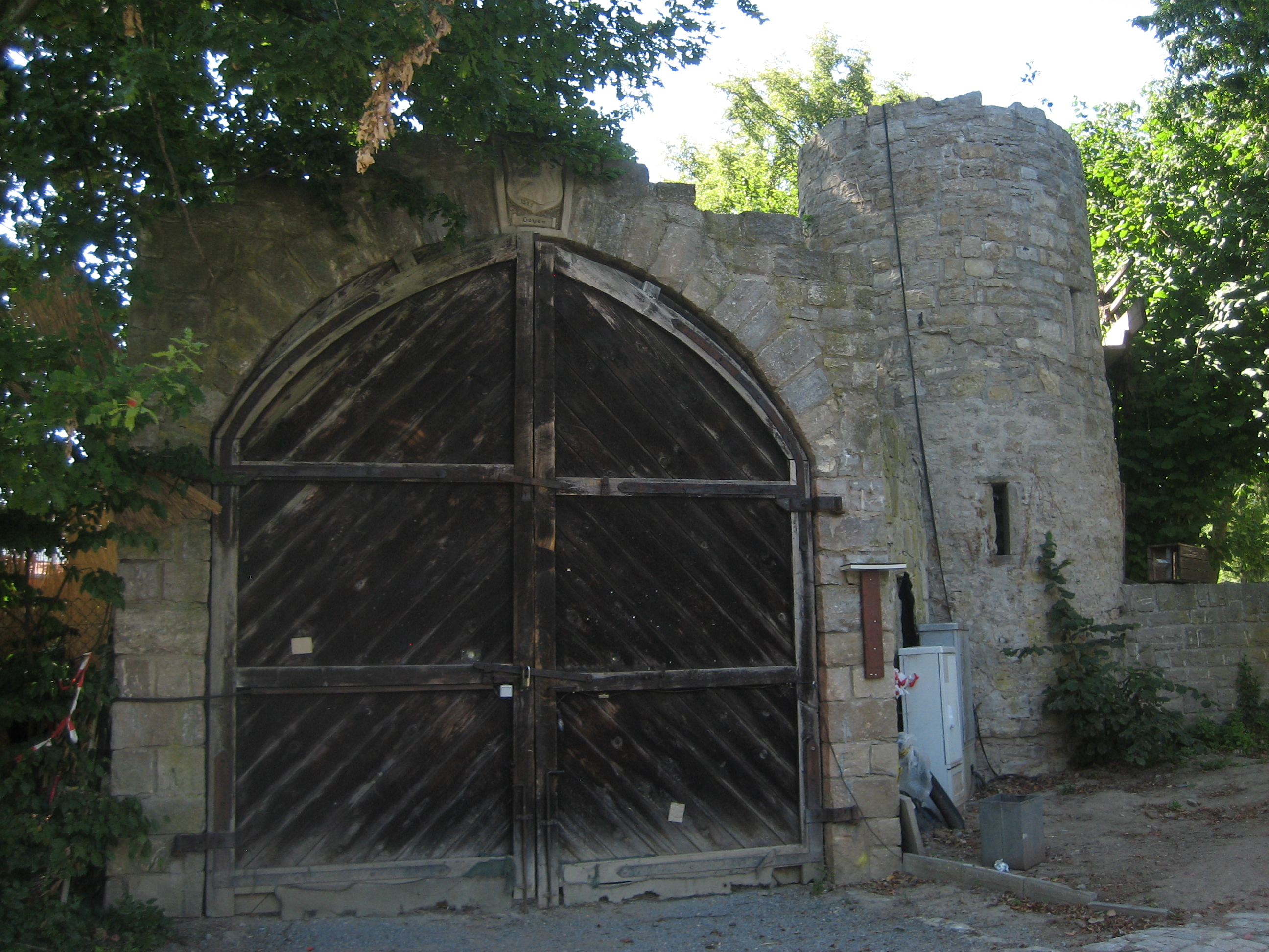 Lage: Am Geyerschloß 7, Giebelstadt bei Würzburg, Franken / Bayern, Deutschland Objektbeschreibung: Schlossruine, laut Liste des Baudenkmälder Ruine des Geyerschlosses, urspr. Rechteckanlage mit Ringgraben, 14./16. Jahrhundert. Das Bild zeigt das Eingangstor im Osten der Ruine.This is a photograph of an architectural monument.